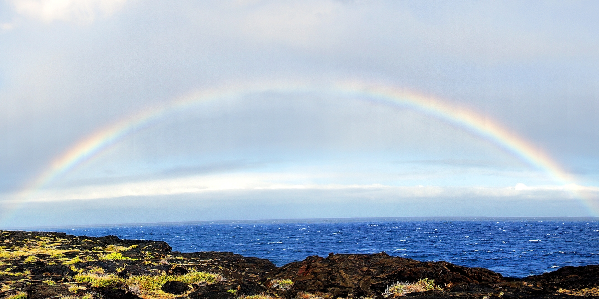 Остров Гвайи. Иллюстрация Второва И.П. для учебника Гавайеведение.